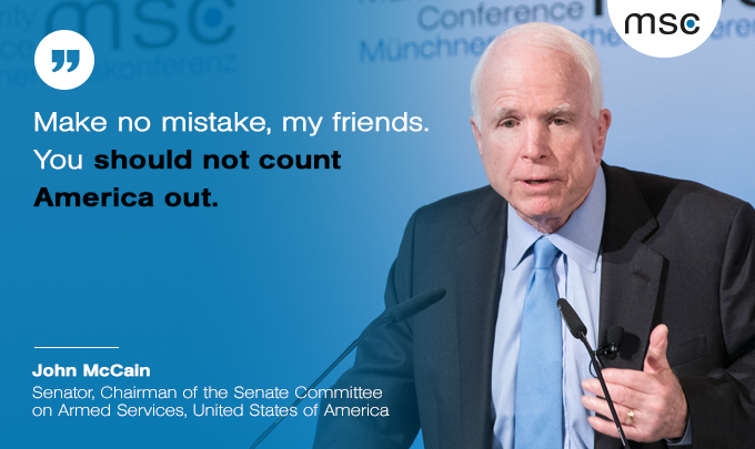 John McCain während der Münchner Sicherheitskonferenz 2017